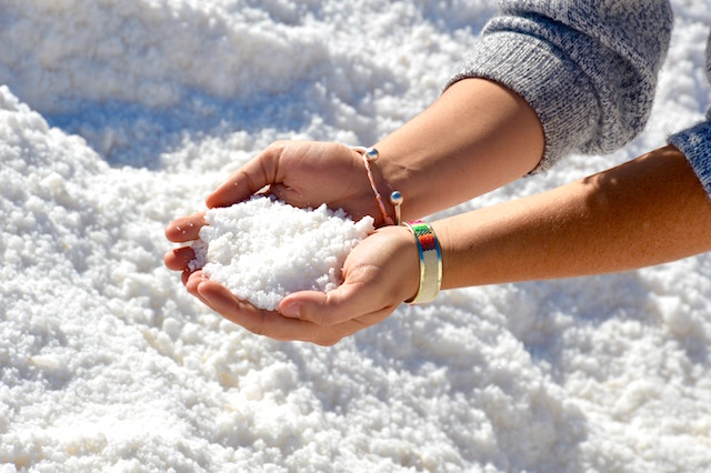 Le sel est en monceaux, facile à prendre dans les mains pour bien comprendre qu'il ne s'agit pas de neige ! Incroyable !